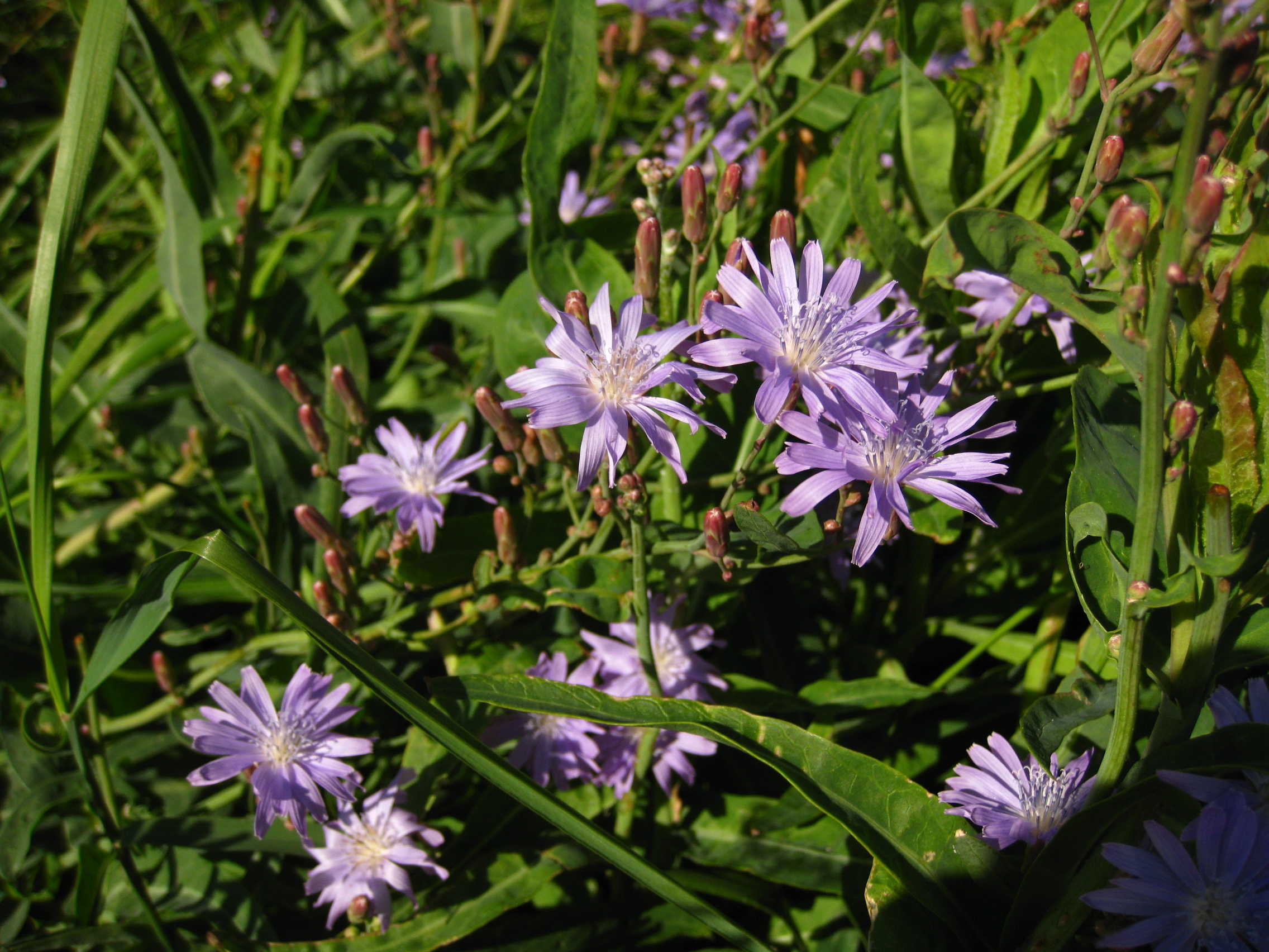 Tatari piimikas (Lactuca tatarica)